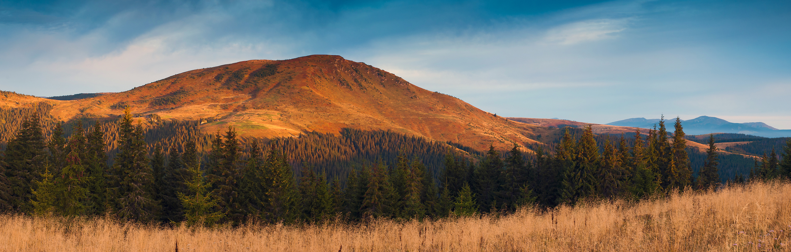 «Чивчино-Гринявський», Верховинський район, Чивчинське лісництво, кв. 11, 13-16, 24, 26-42 Буркутське лісництво, кв.14-19,23-25, 32-35 Паркалабське лісництво, кв.8,9,14,16-20 . Полонини: «алузька», «Прелуки», «Ретундул», «Лустун», «Мале Пір'є», «Попадя», «Гнітеса», «Чивчин», «Штевйора»